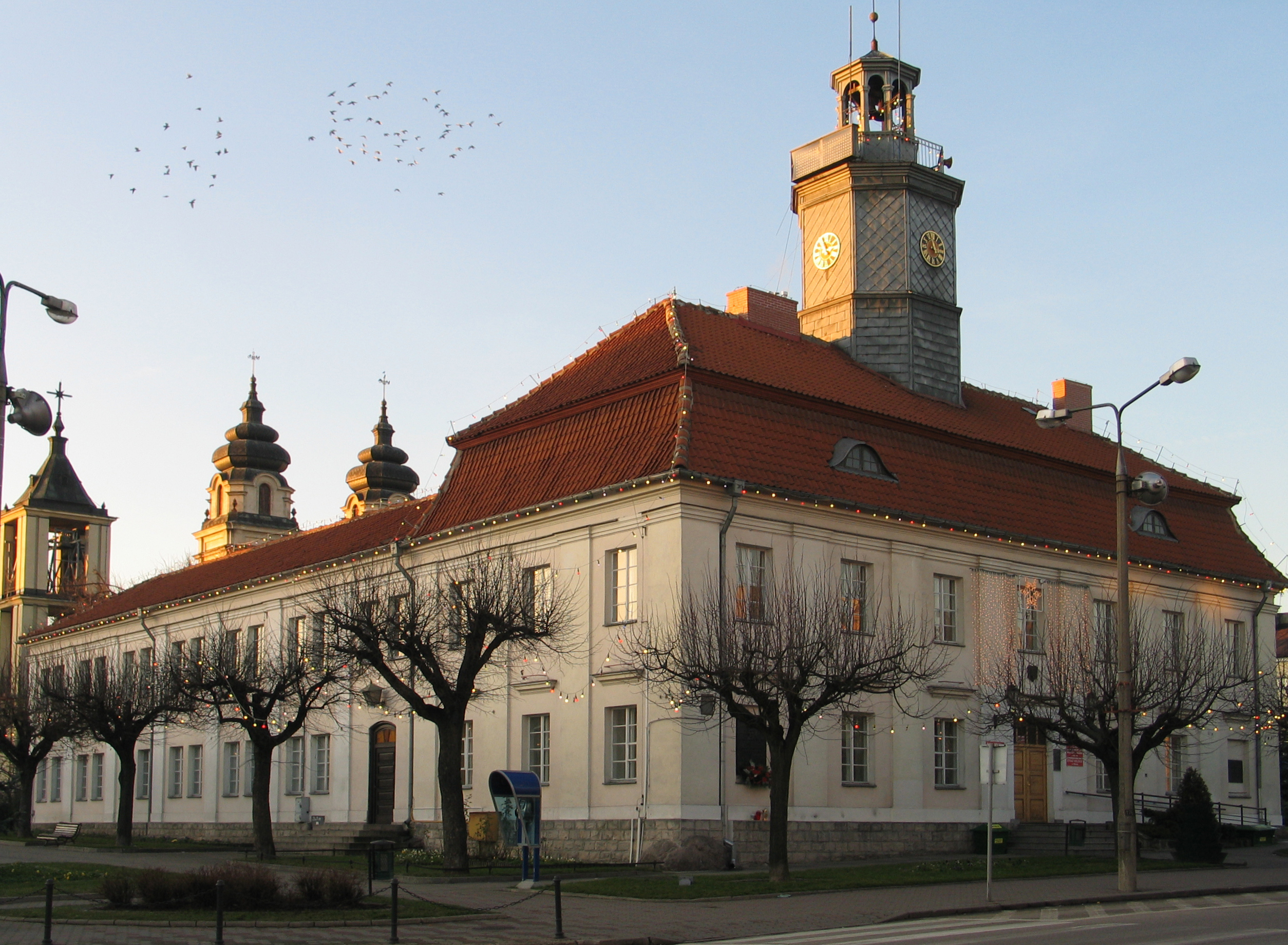 Ratusz miejski w Mławie na Starym Rynku. Historyczny budynek z wieżą zegarową i dobudowane w czasie II Wojny Światowej skrzydło (po prawej). W tle dzwonnica i wieże kościoła Św. Trójcy. Mława, woj. mazowieckie, Polska.